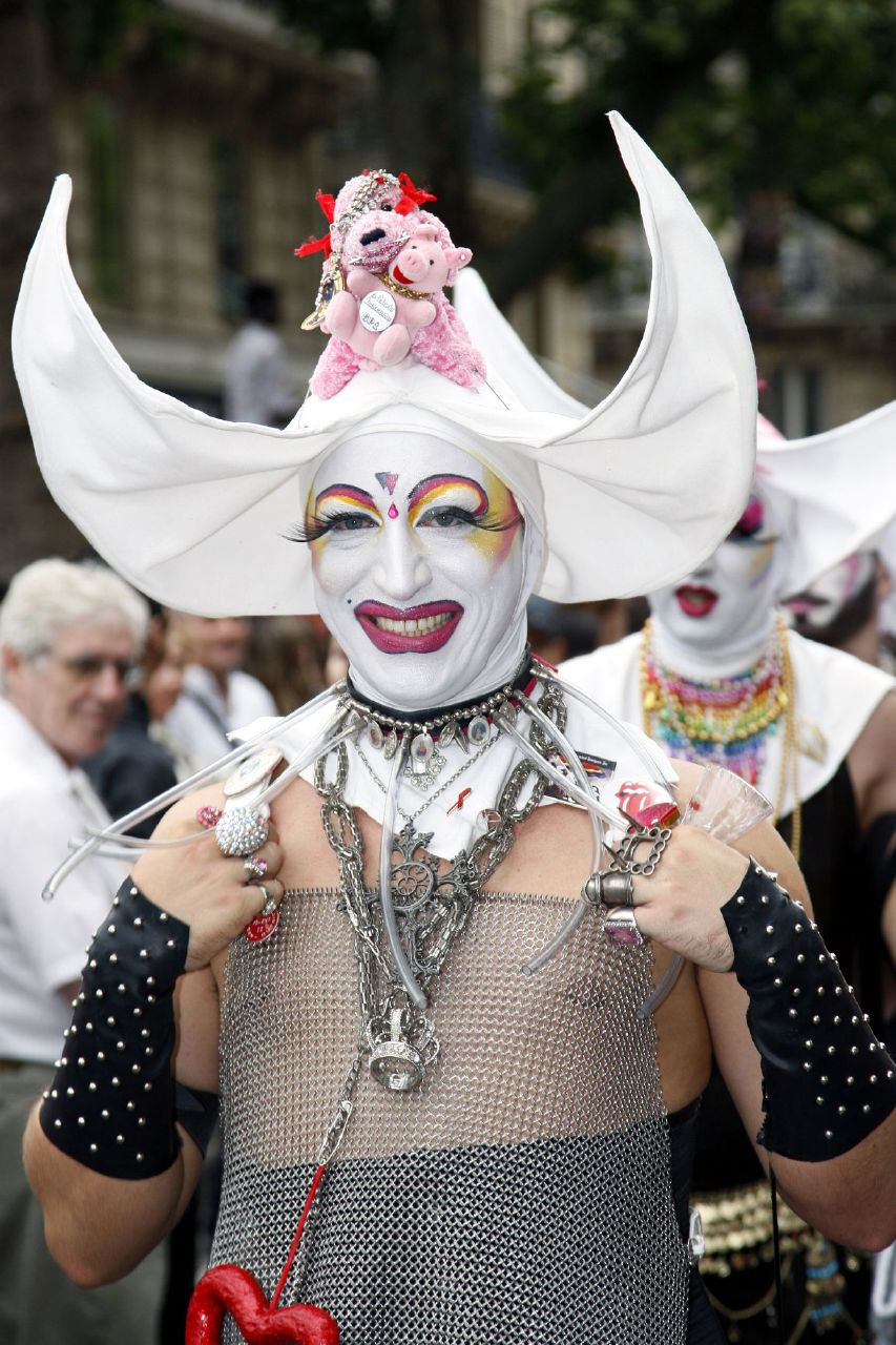 Sister Innocenta (Soeur Innocenta) of the Sisters of Perpetual Indulgence, Paris House, France (Les Soeurs de la Perpétuelle Indulgence - Couvent de Paris) at Gay-Pride, Paris, 2007.